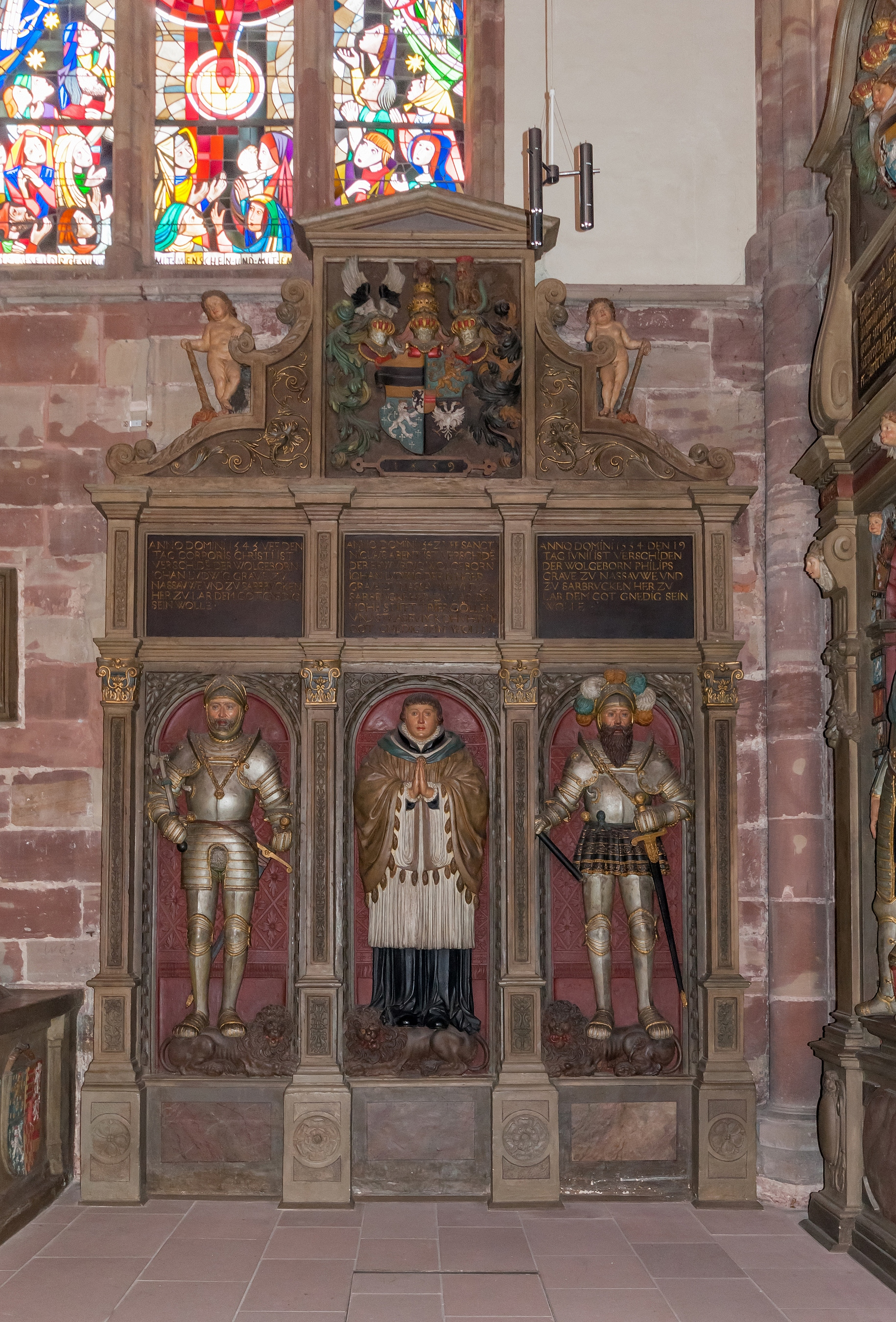 Grabmäler im Seitenschiff der Stiftskirche St. Arnual, Saarbrücken.